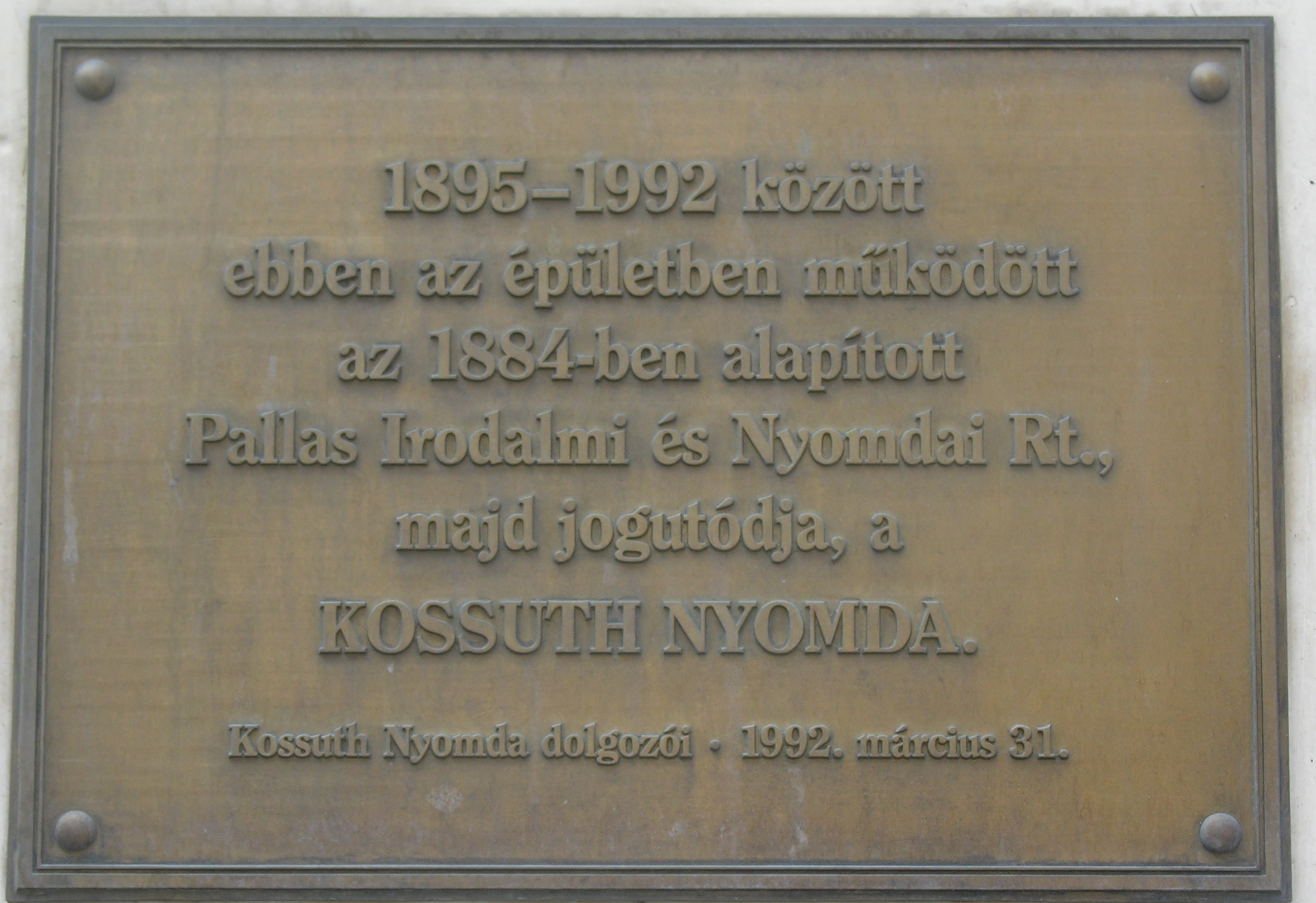 Pallas Nyomda emléktáblája, Budapest, V., Honvéd utca 10.